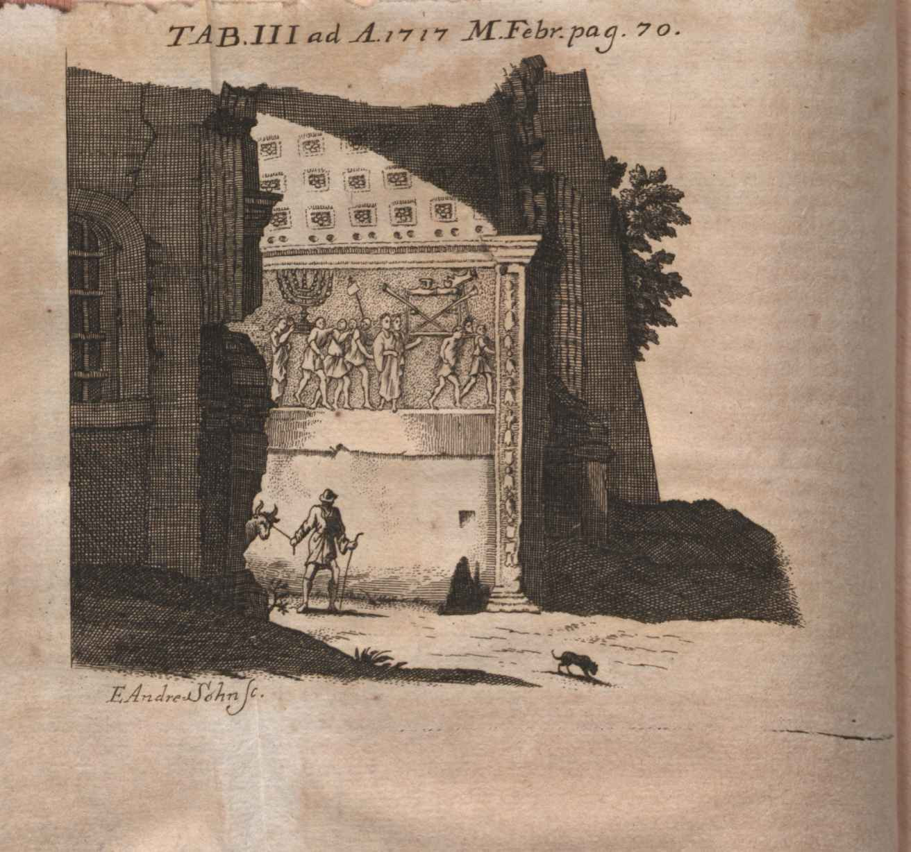 Illustration